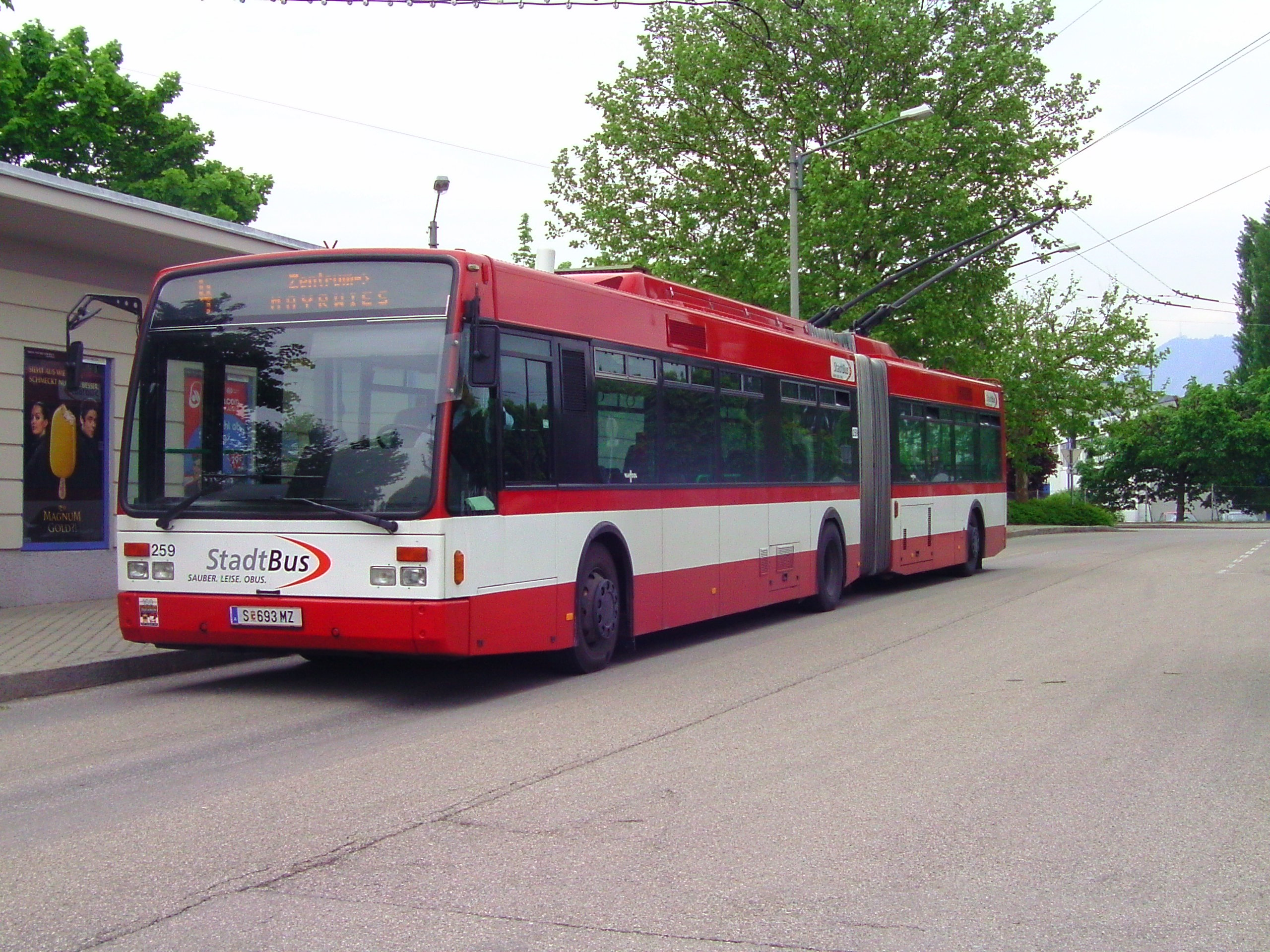 Einer der VanHool aus Montreux